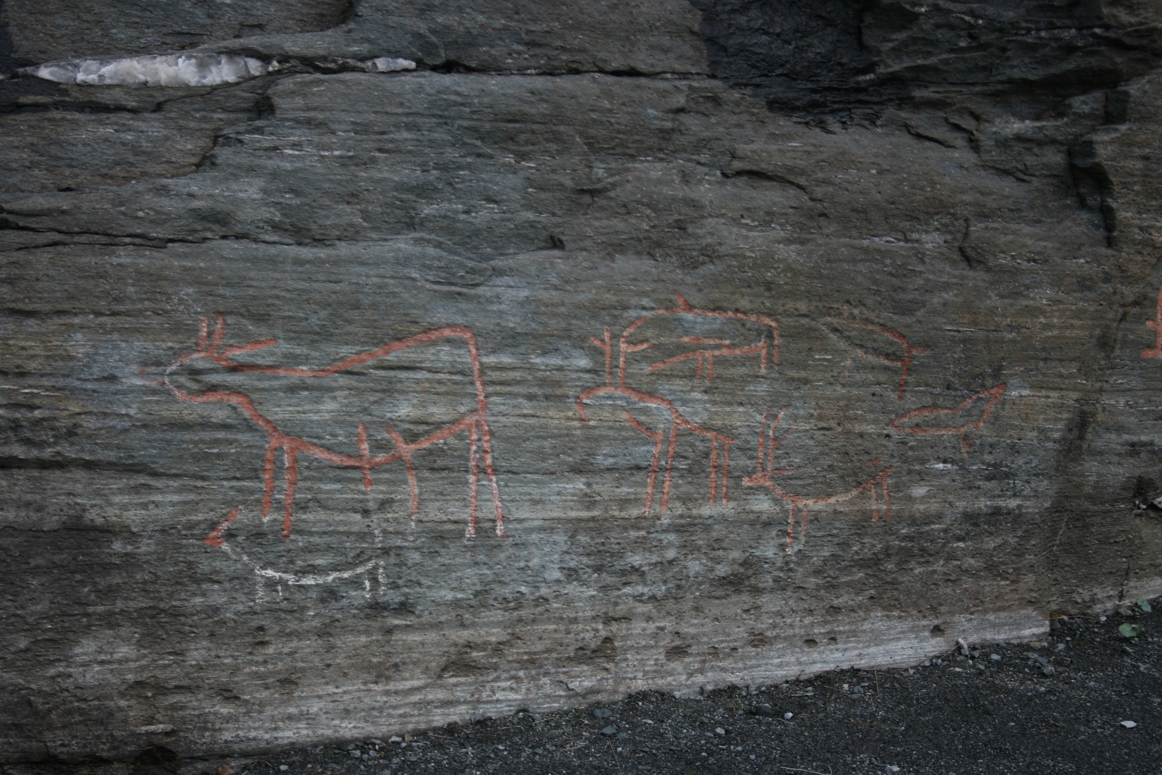 Helleristningene på Skavberget 3